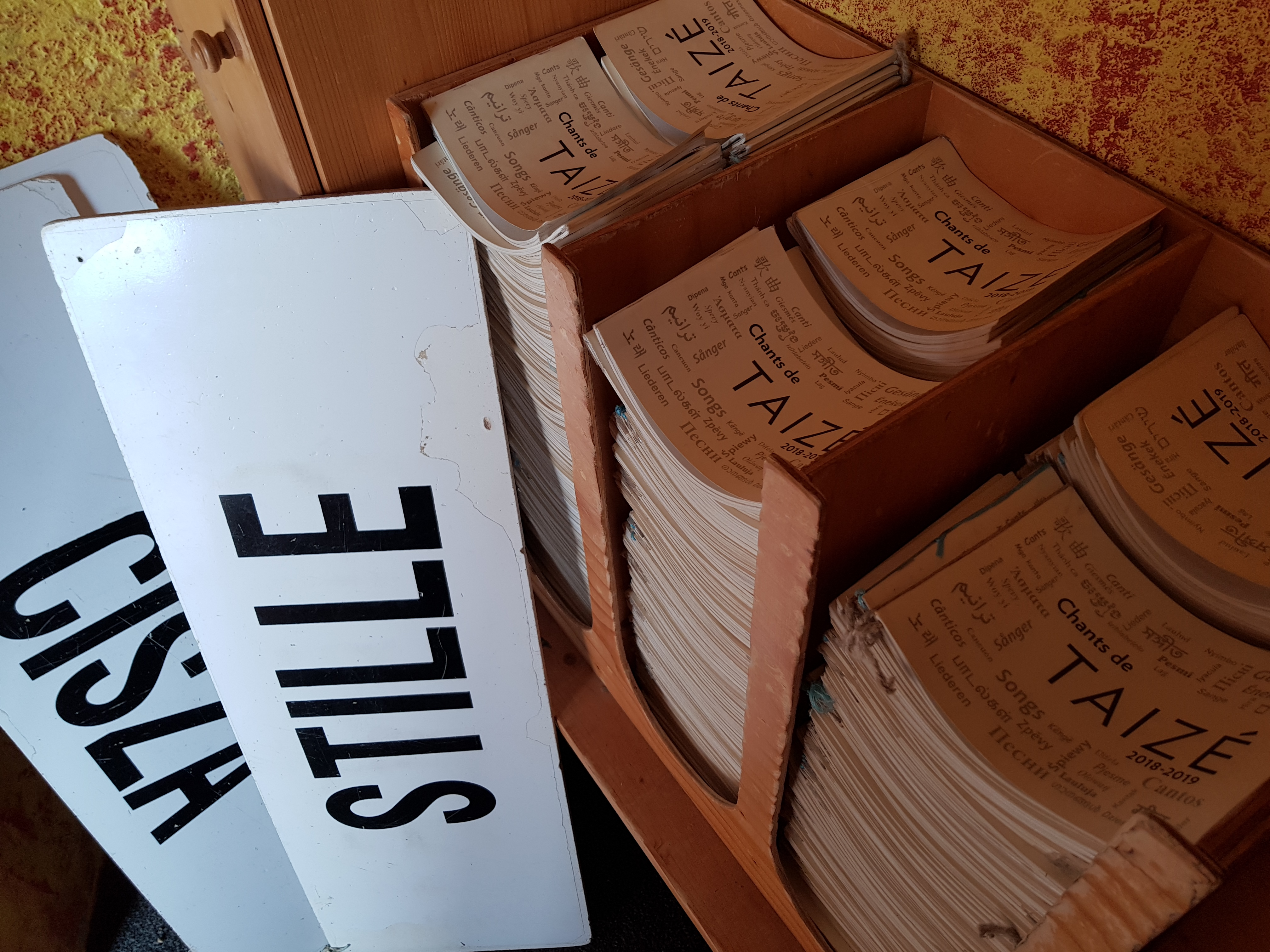 Am Eingang der Kirche